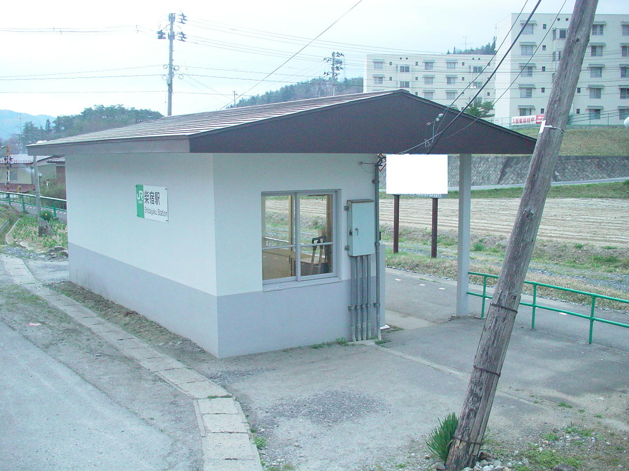 （柴宿駅）